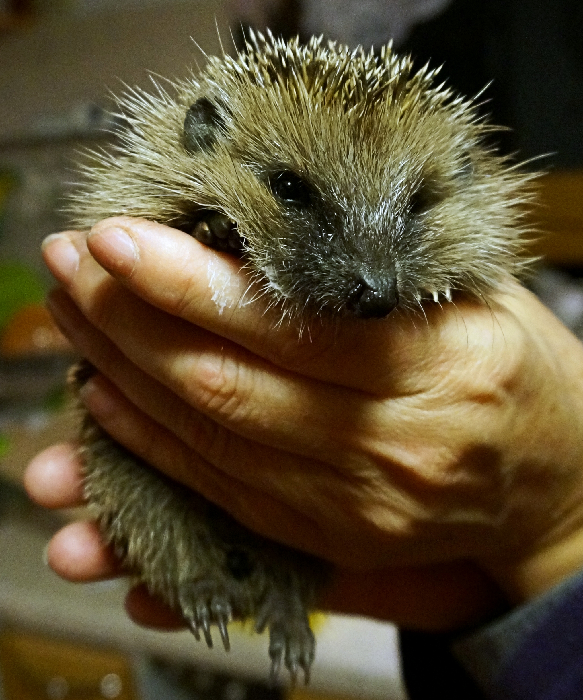 Junger Igel, ca. 240 Gramm schwer